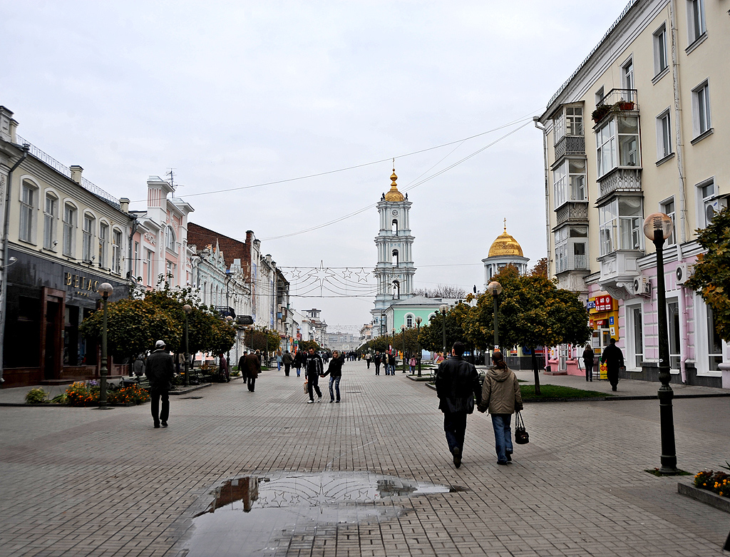 Соборная